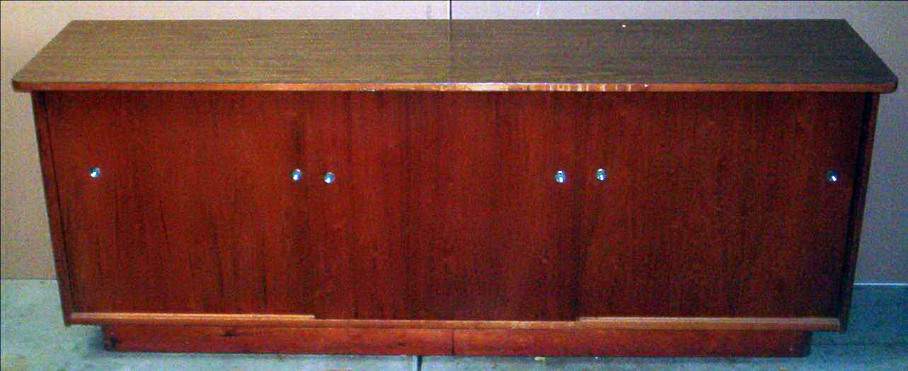 Credenza- Noun- A piece of furniture.